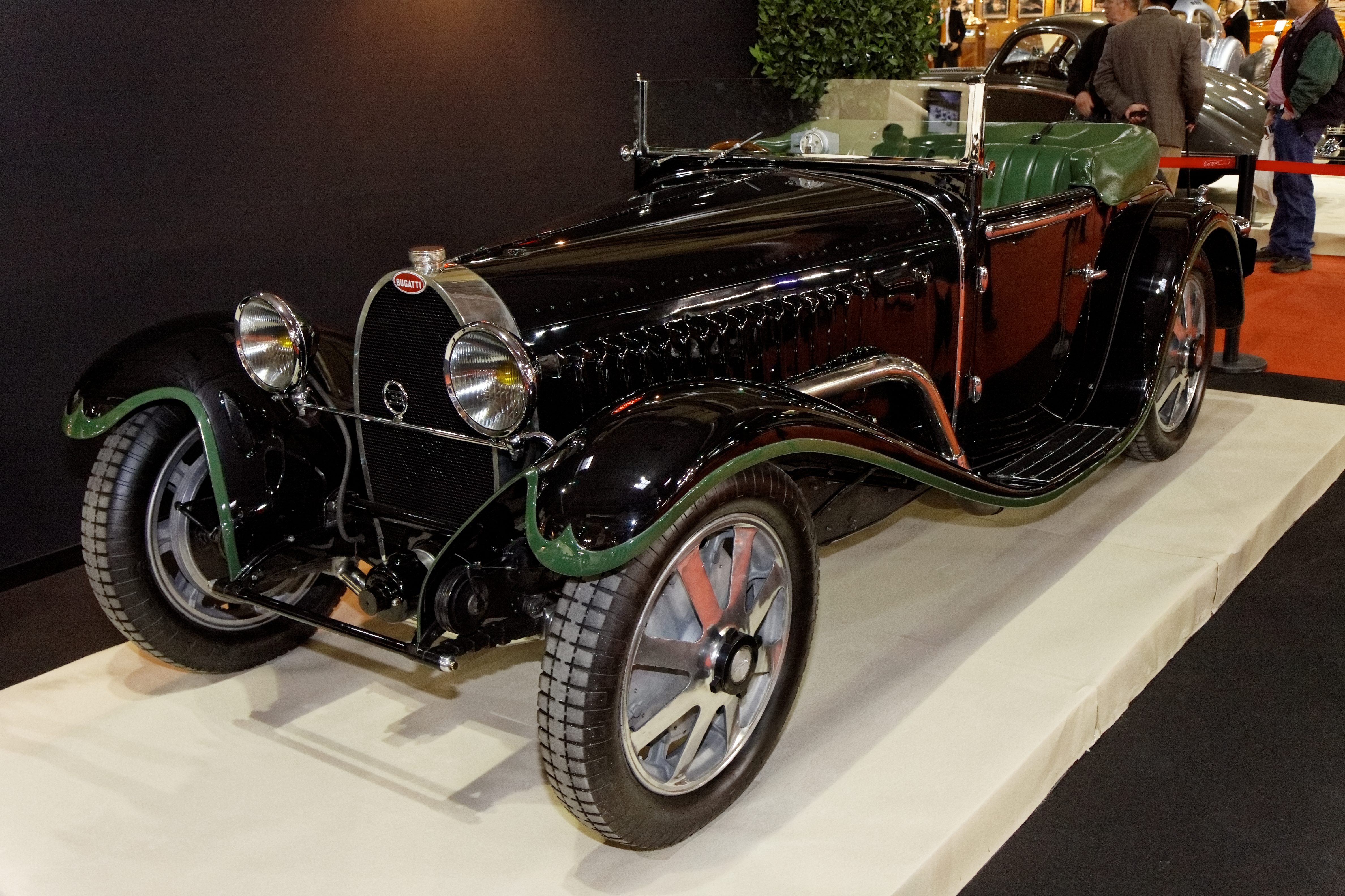 Bugatti Type 55 Cabriolet Billeter & Cartier, Chassis Nr. 55206 (1932)